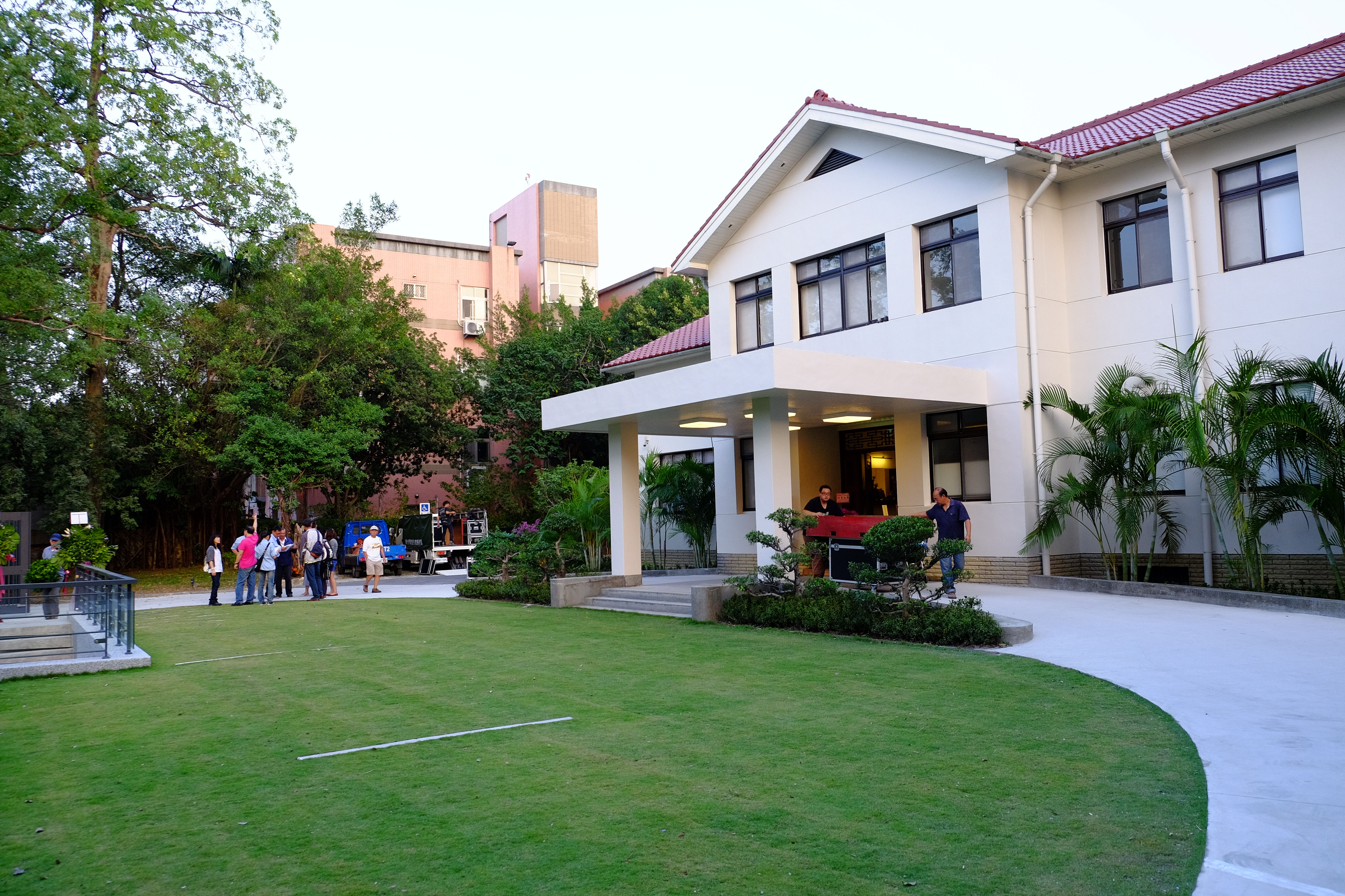 孫運璿重慶南路寓所，位於臺北市中正區重慶南路二段6巷10號。